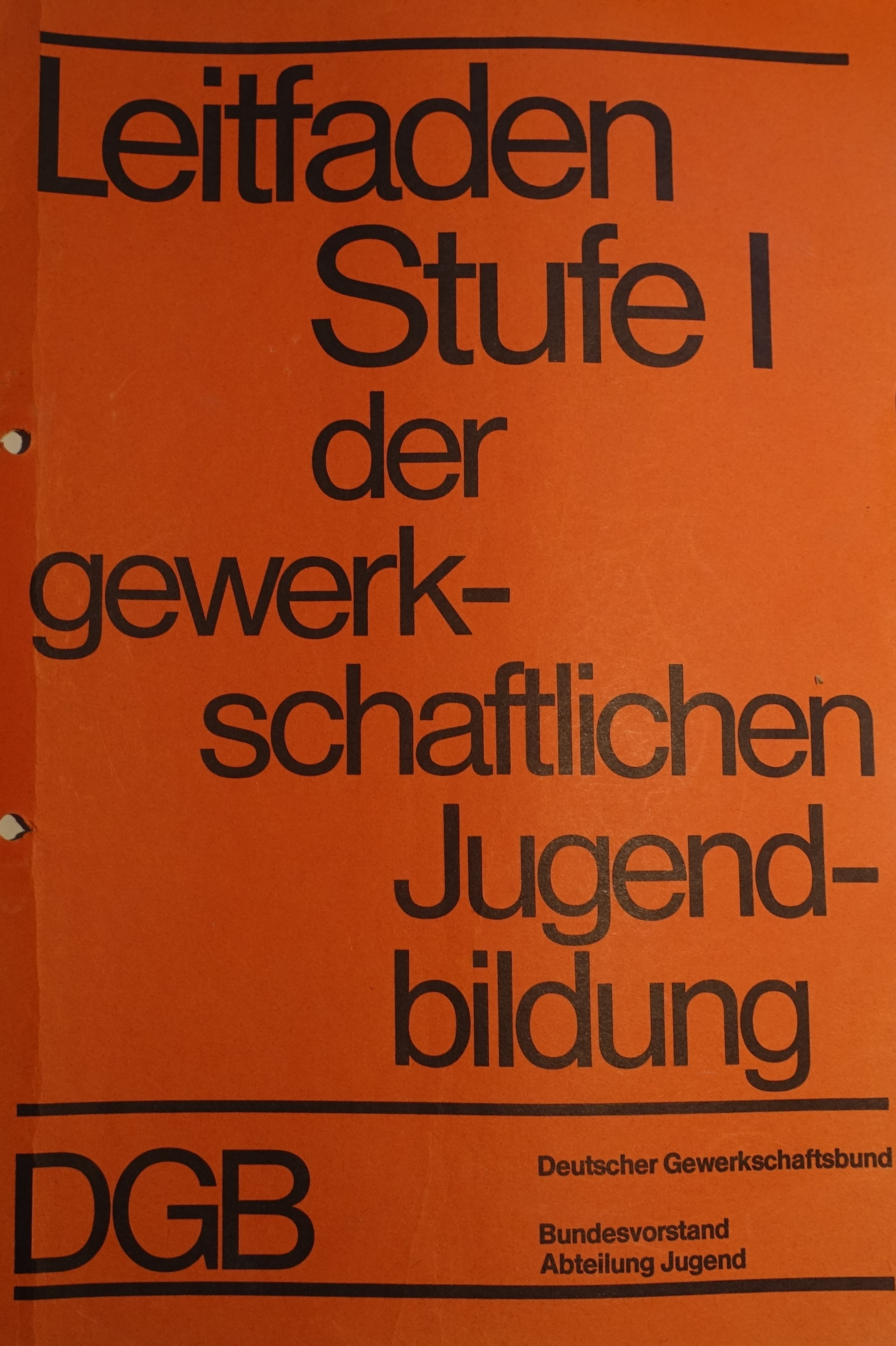 Leitfaden der gewerkschaftlichen Jugendbildung 1973